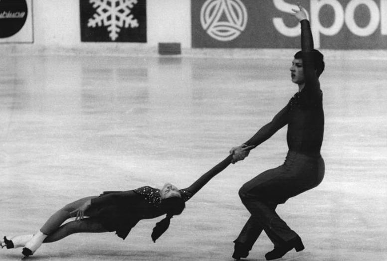 Irina Mirowenko, Dmitri Schkidtschenko ADN-ZB Thieme 17.11.84 Karl-Marx-Stadt: Pokal der Blauen Schwerter-Beim Paarlaufen im Junioren-Eiskunstlaufwettbewerb um den "Pokal der Blauen Schwerter" errang das sowjetische Paar Irina Mirowenko-Dmitri Schkidtschenko den ersten Platz.